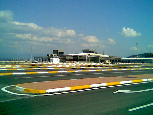 Güzelyalı Feribot İskelesi-Terminal